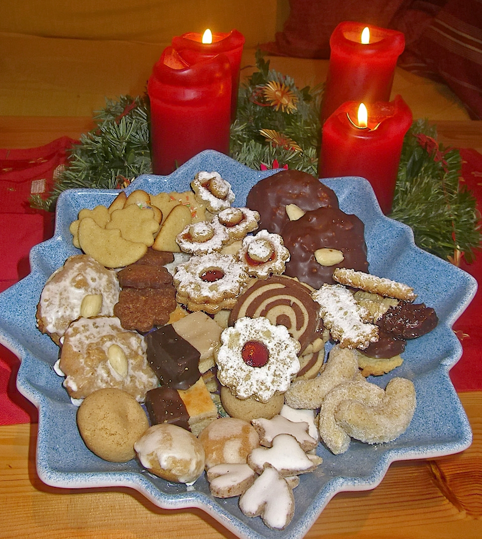 Weihnachtsgebäck mit verschiedenen, traditionellen Garnierungen.